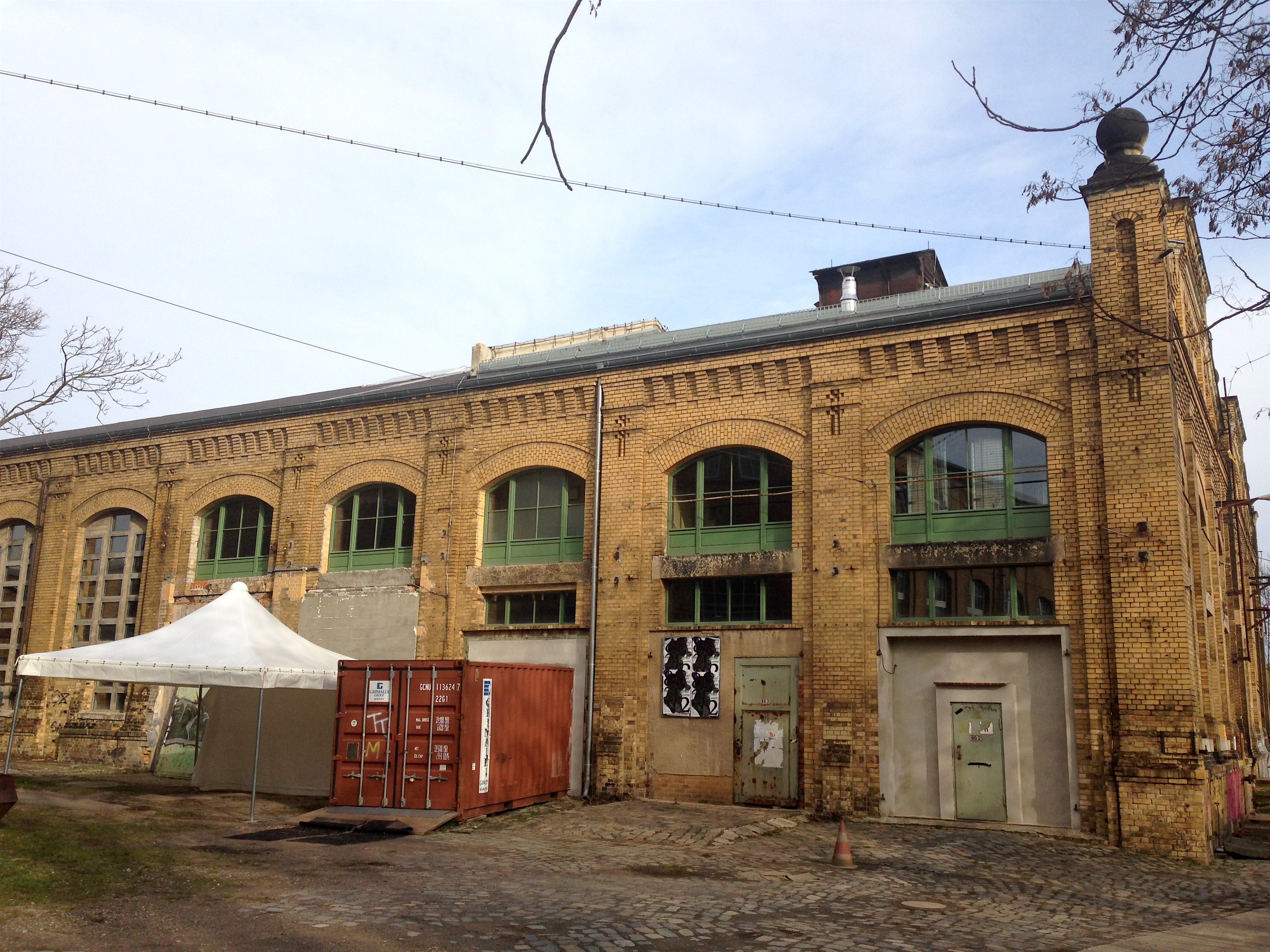 Kunstkraftwerk Leipzig, Aussenansicht